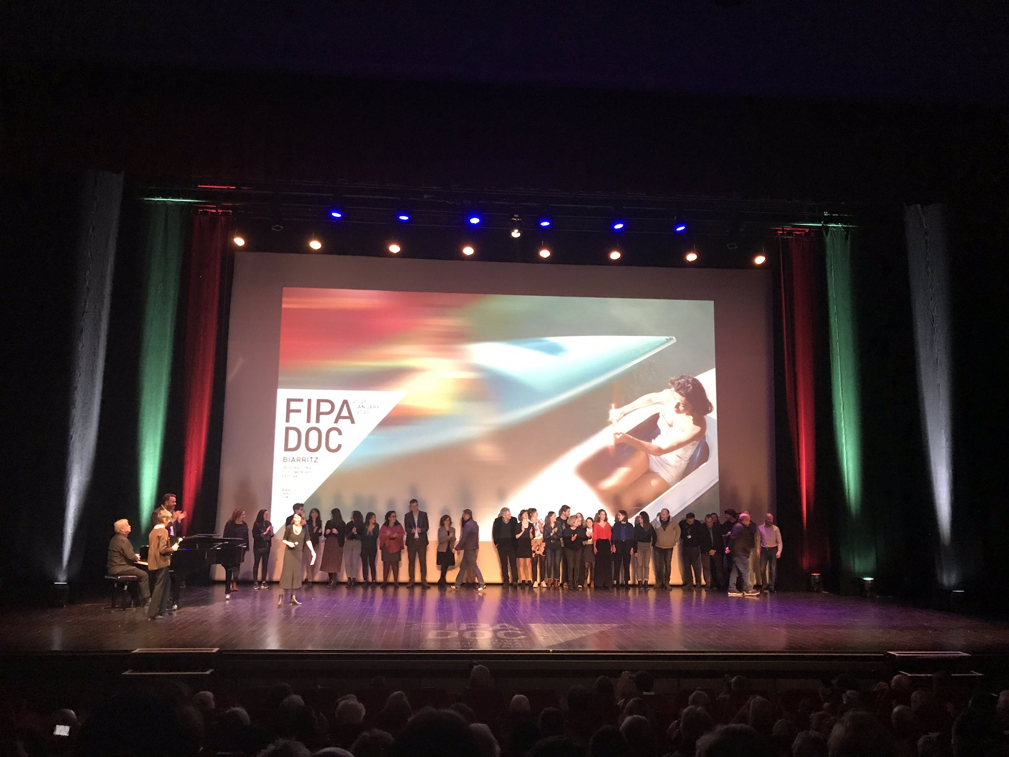 Cérémonie de Clôture du FIPADOC 2020 - Gare du midi